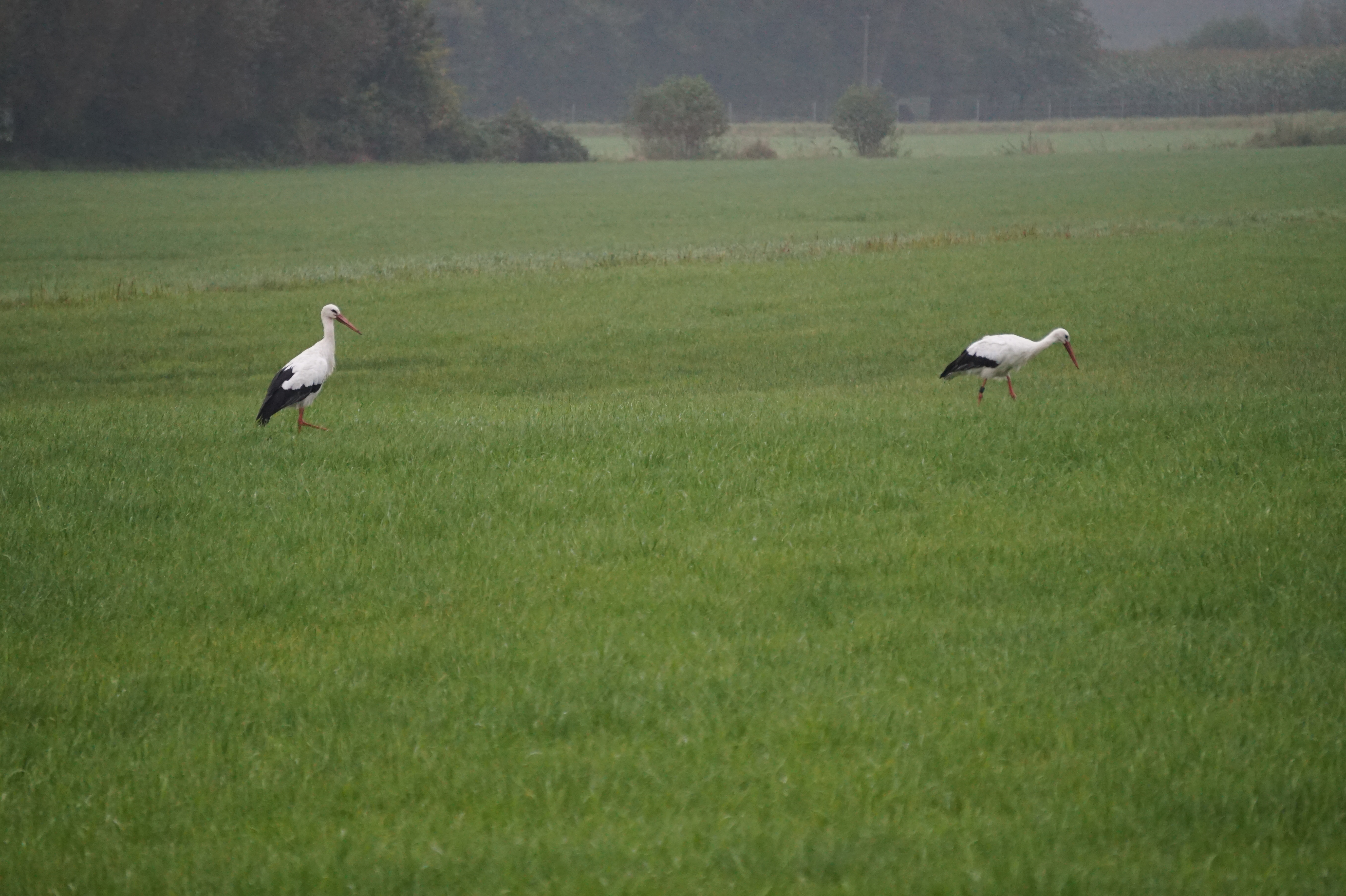 Weißstörche (Ciconia ciconia) im Naturschutzgebiet Große Wiese, Kreis Gütersloh, Nordrhein-Westfalen.